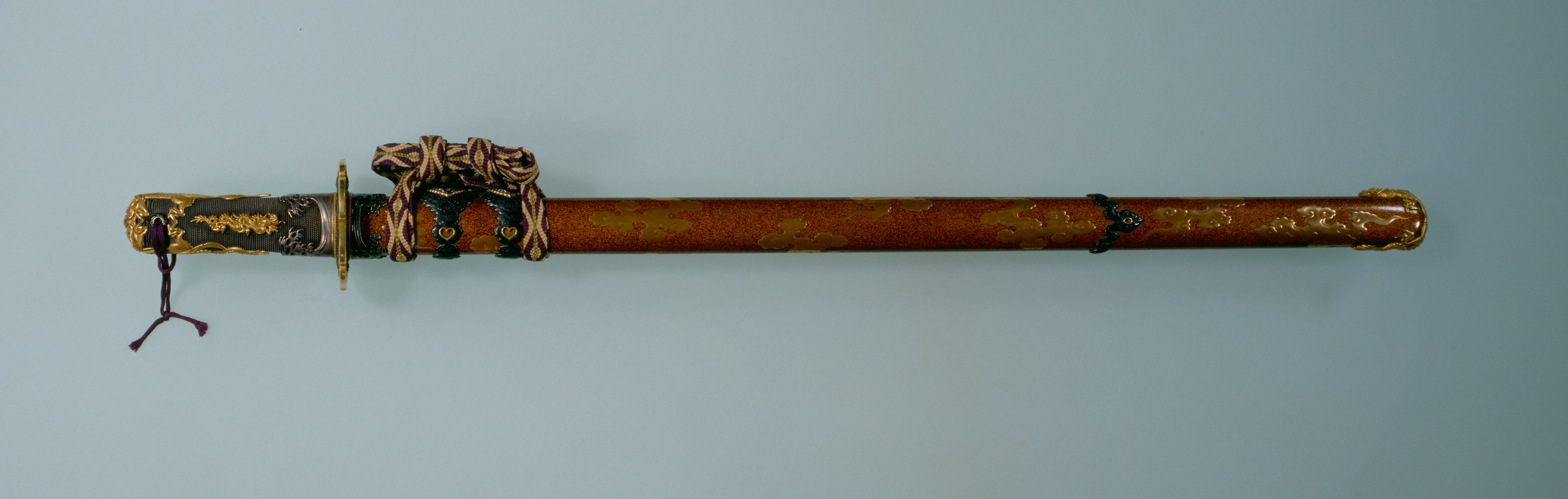 重要文化財「直刀 無銘（号 水龍剣） 附 梨地水龍瑞雲文宝剣」、刀身：奈良時代・8世紀、金具：明治6年（1873）。東京国立博物館蔵。